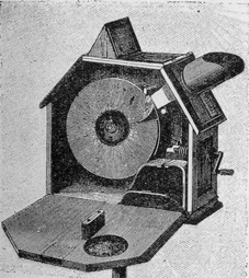 Composición del Kinematoscopio patentado por Colleman Sellers